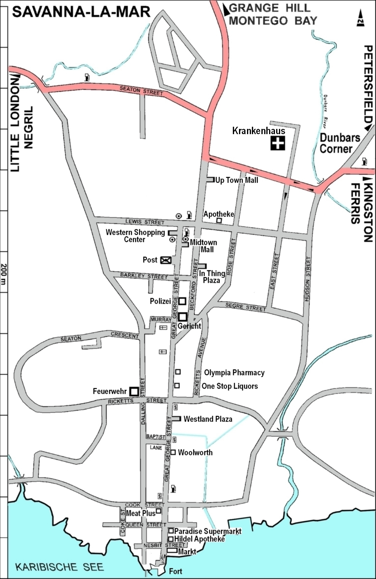 Straßenkarte von Savanna-La-Mar, Jamaika